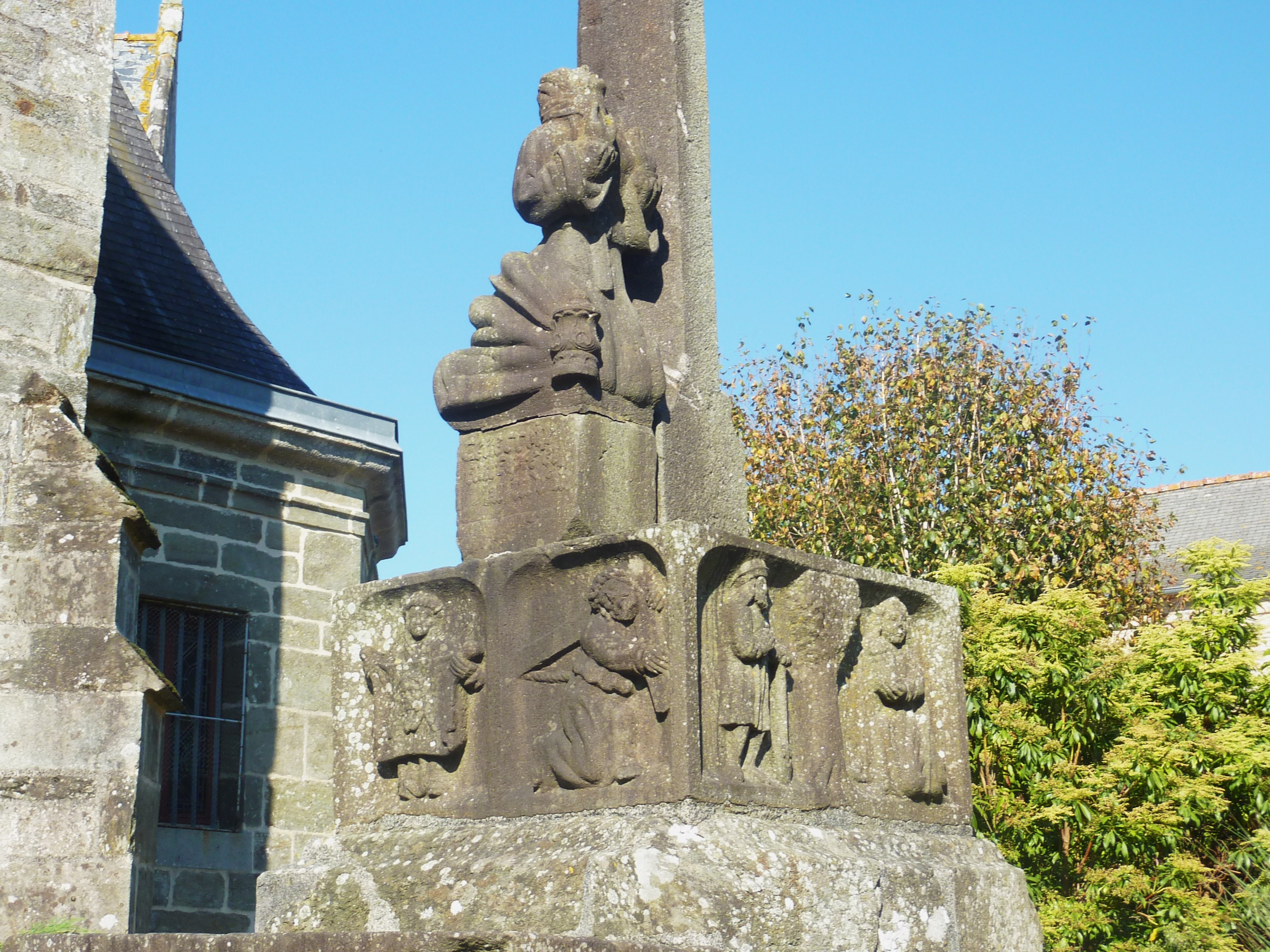 Lopérec : borg, calvaire partie inférieure